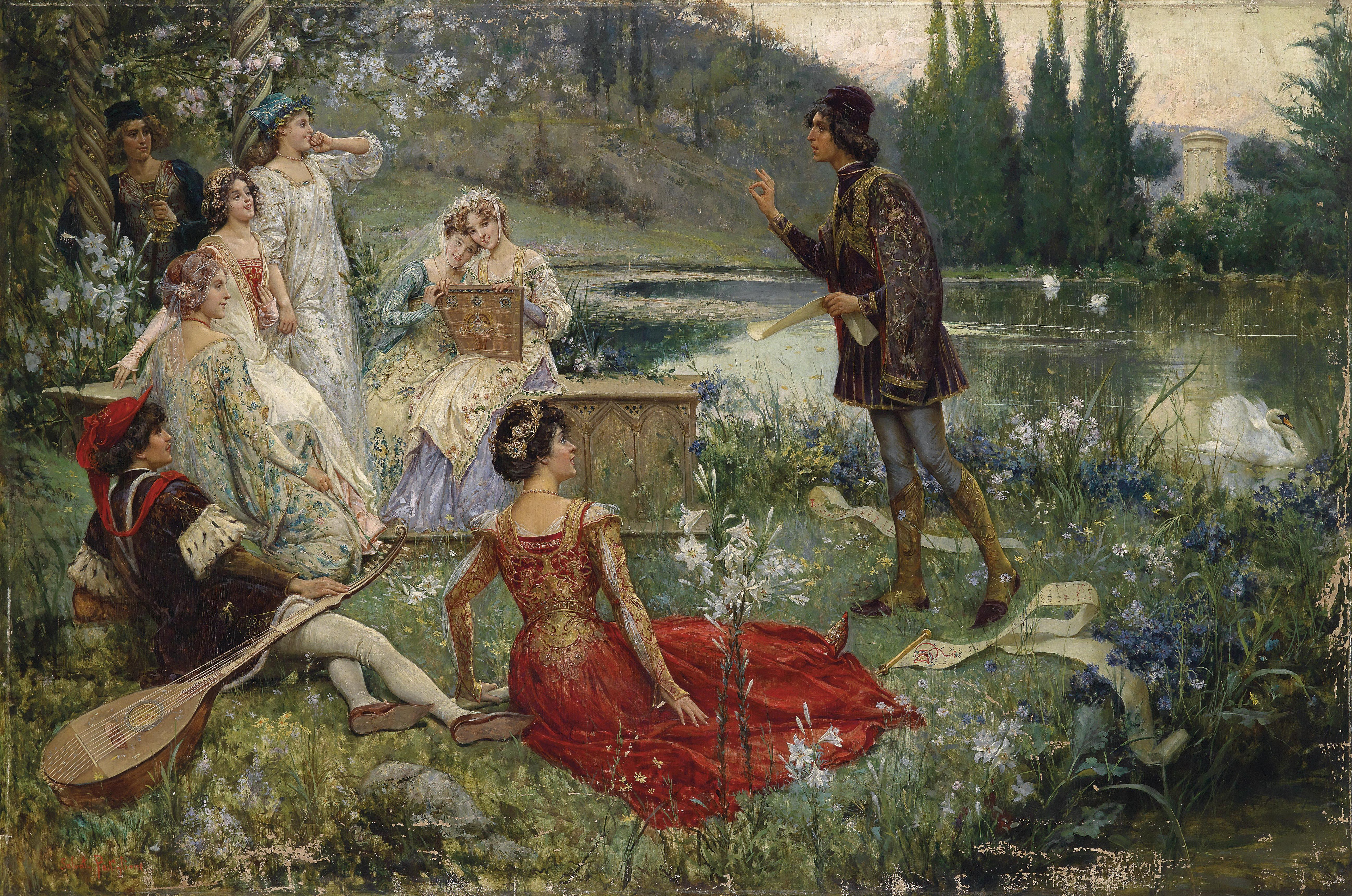 Motiv aus der Erzählung des Dekameron (Il Decamerone) von Giovanni Boccaccio